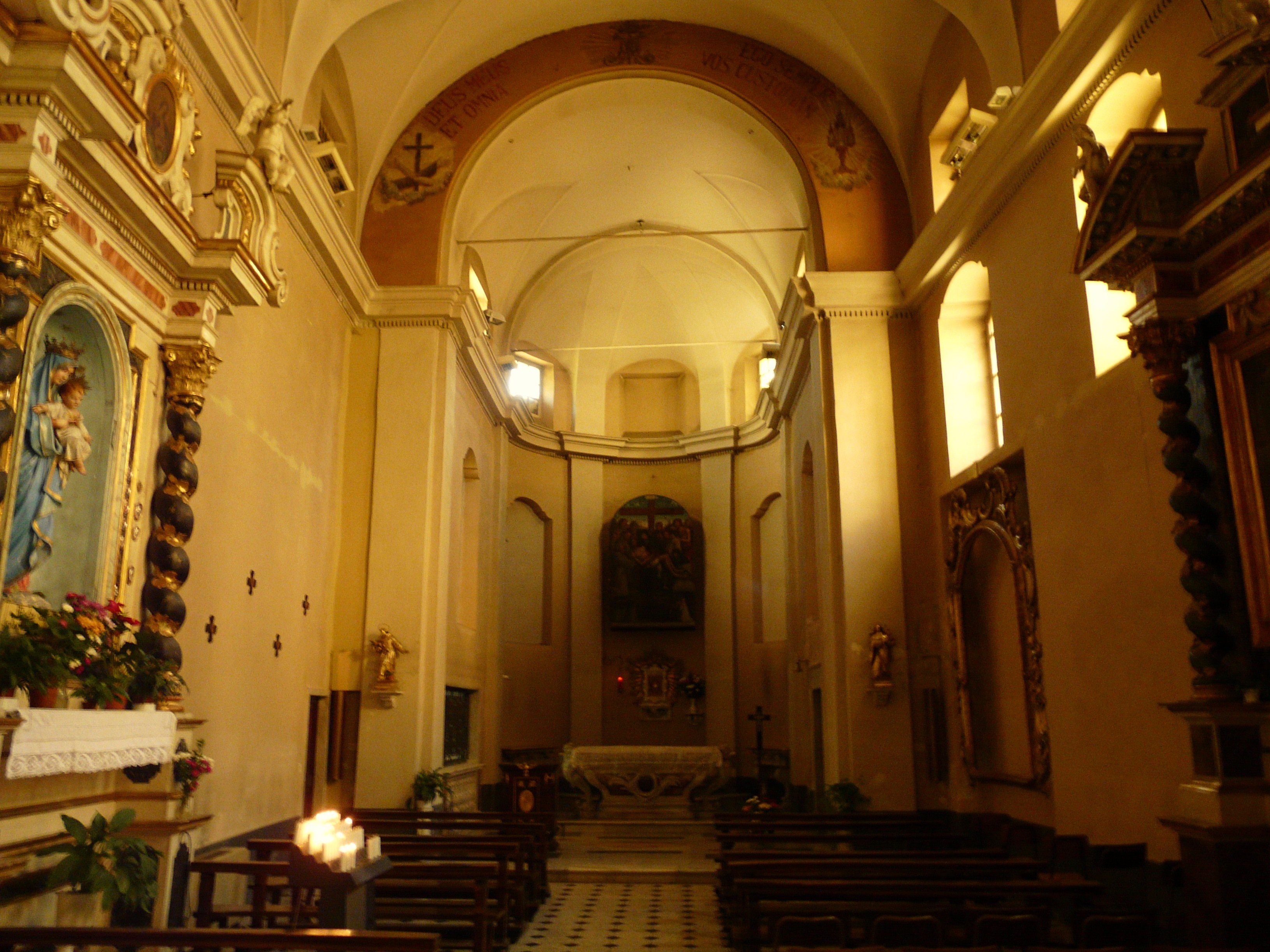 Interno del monastero di San Bernardino da Siena o delle Clarisse, Chiavari, Liguria, Italia